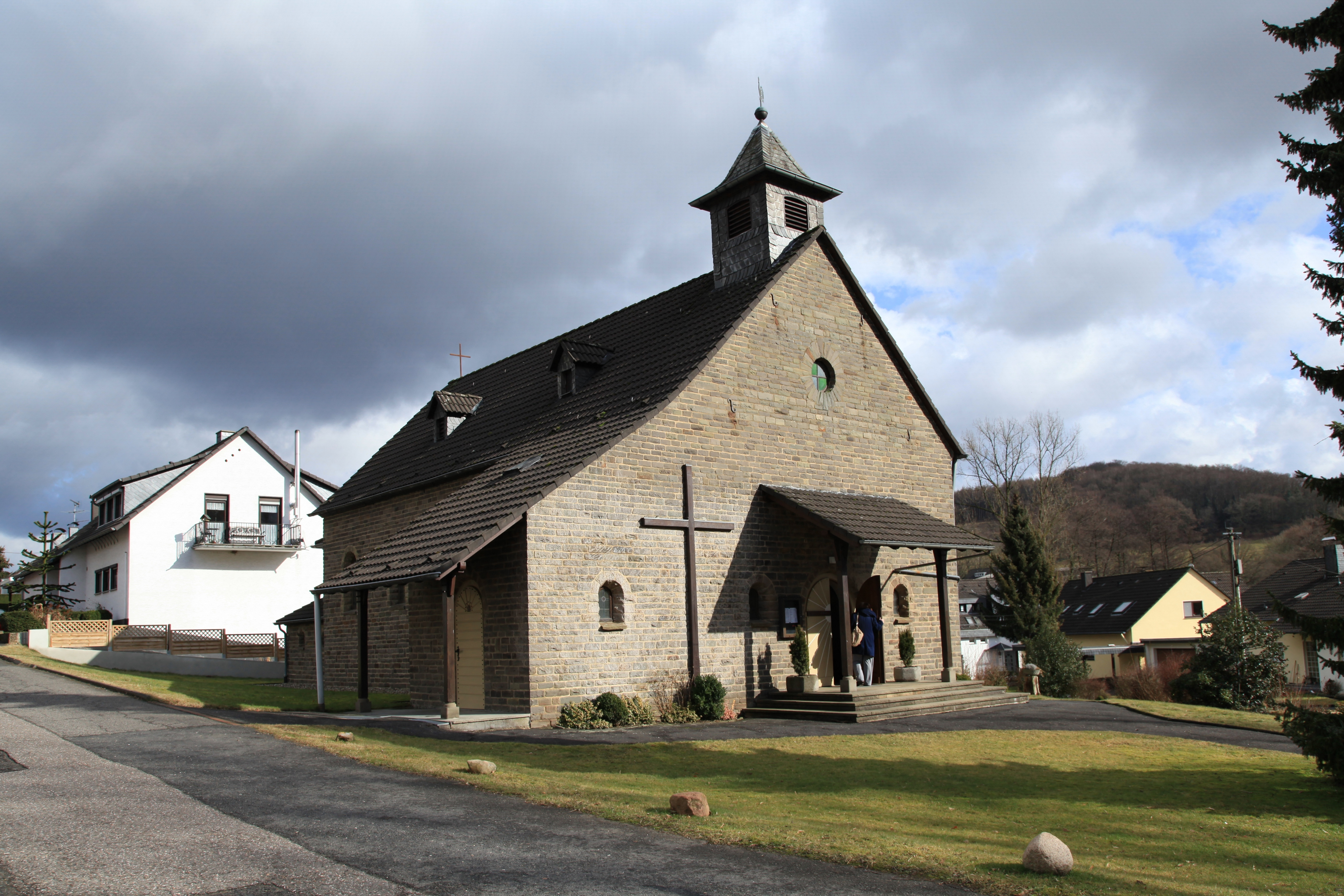 Heilig-Kreuz-Kirche, Kapellenweg 2 / An der Scherf in Odenthal-Klasmühle